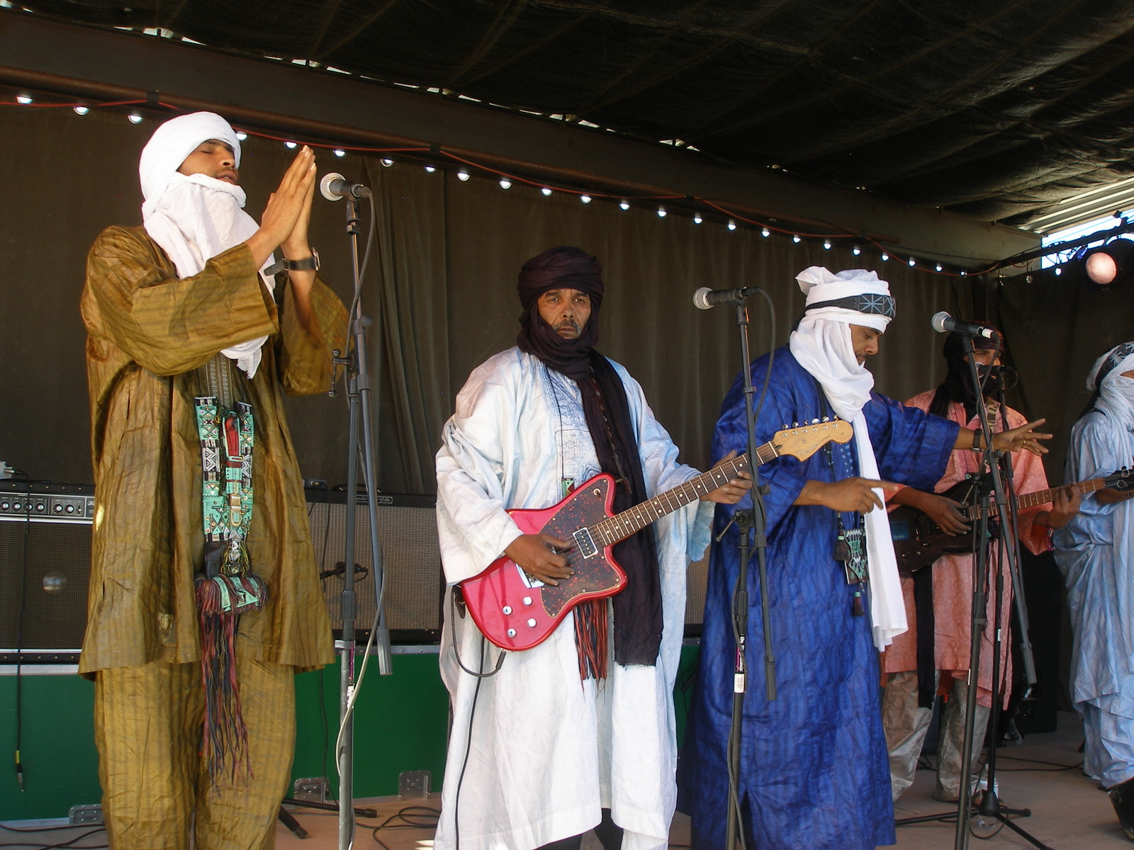 TINARIWEN at Santa Fe Brewing Co. 4-19-09